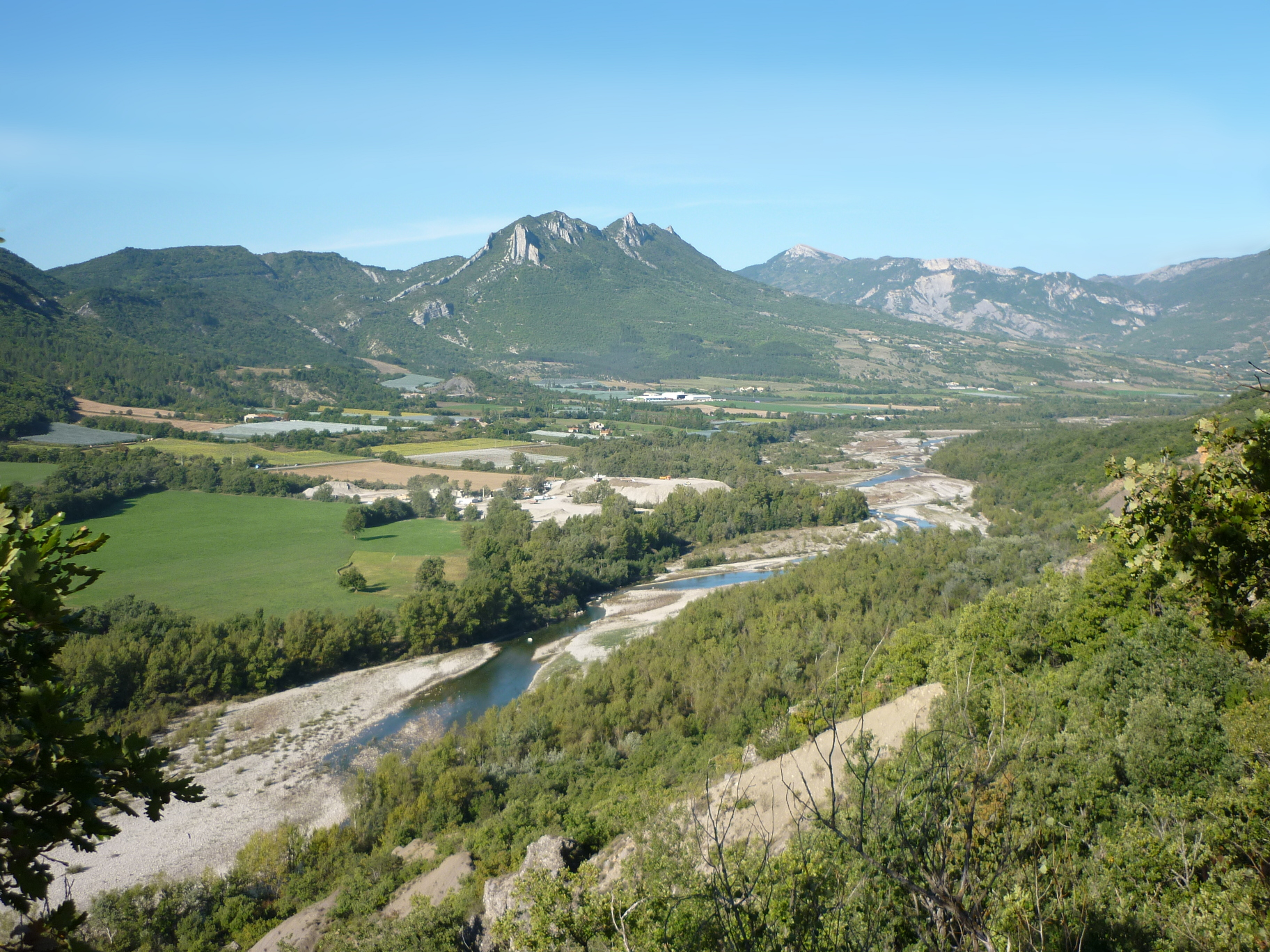 Le Büech entre Ribiers et Sisteron